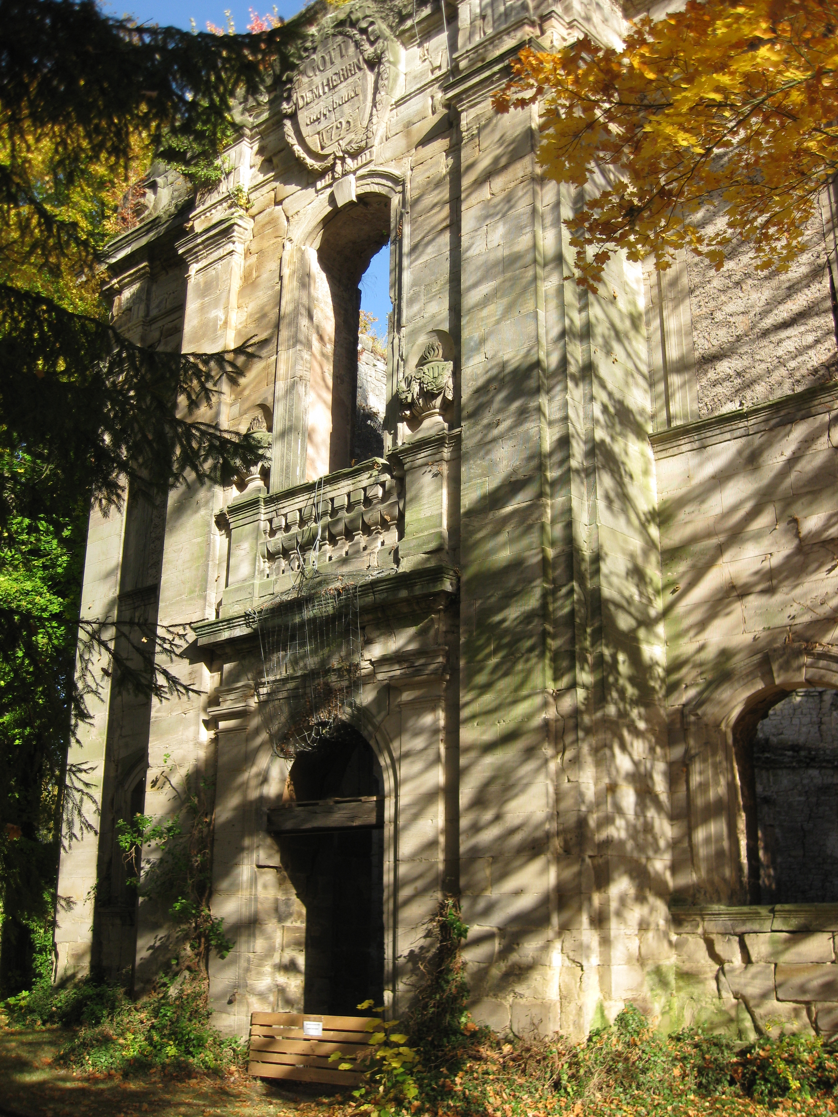 Die Ruine der Klosterkirche Gerode